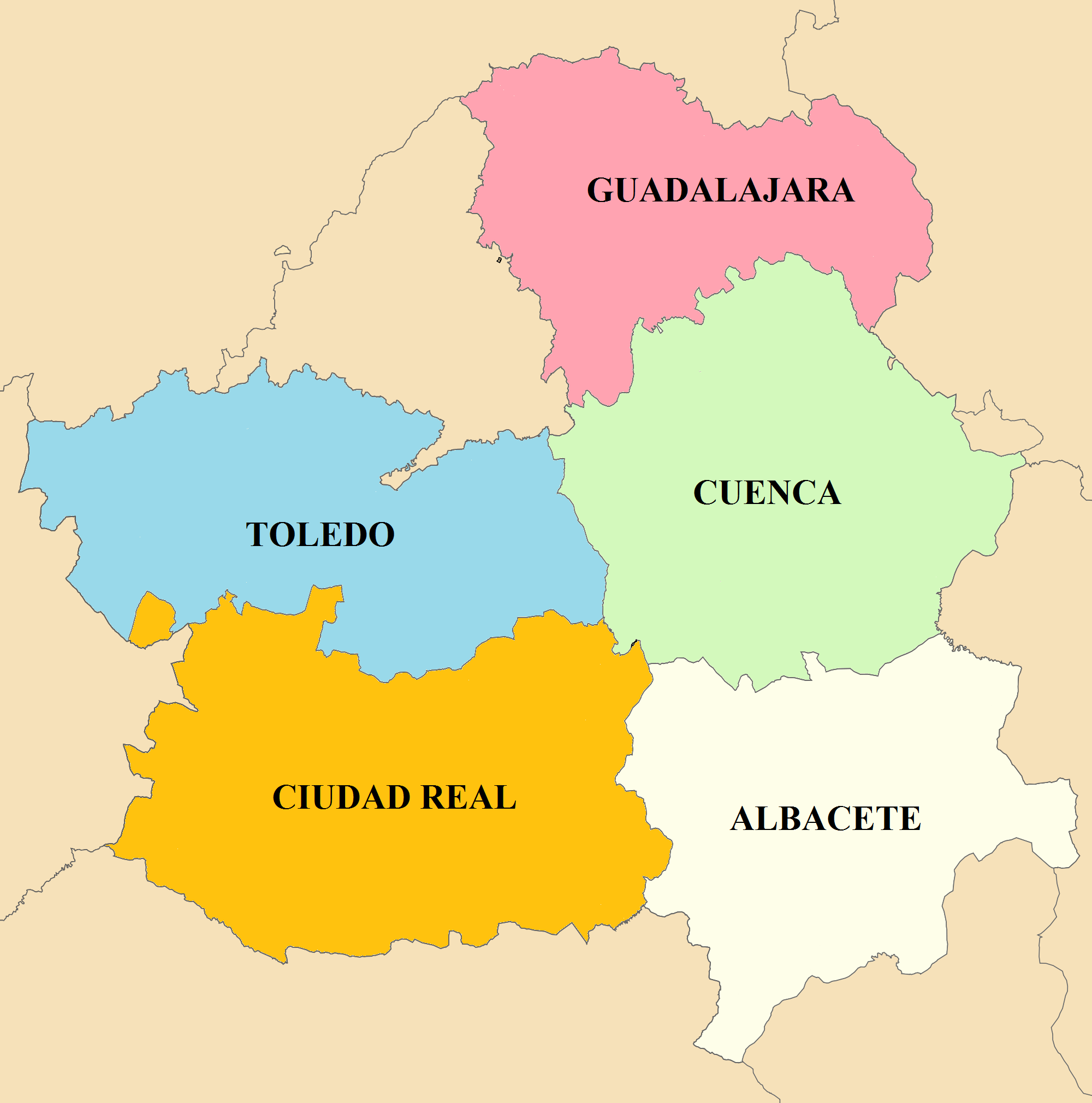 Mapa con la distribución provincial de Castilla-La Mancha